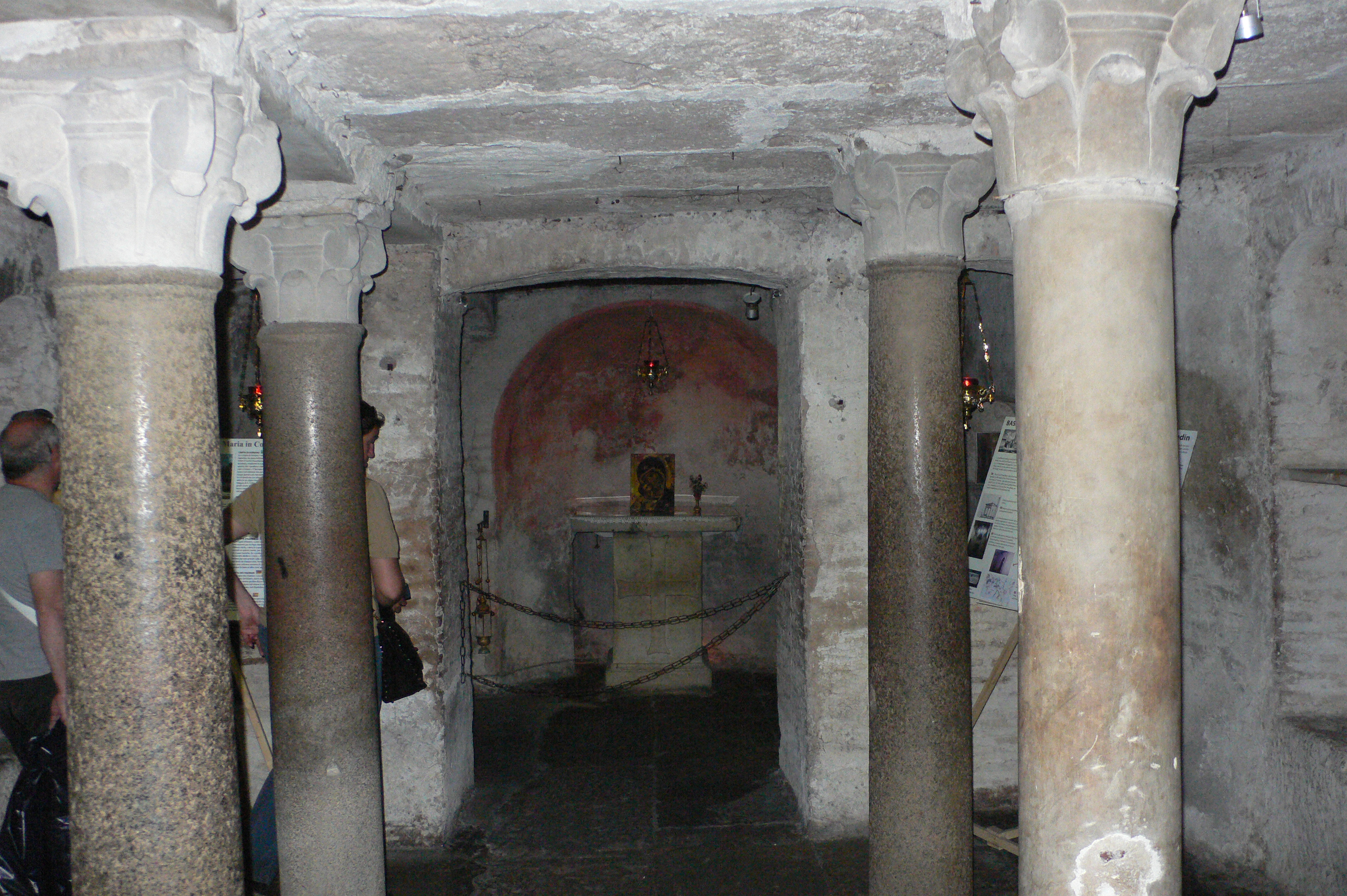 Die Krypta der Kirche aus dem 8. Jh. mit Spoliensäulen und halbrunder Apsis. Hier ist das Grab des Märtyrers Pancratius.